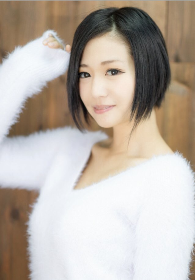 プロフィール